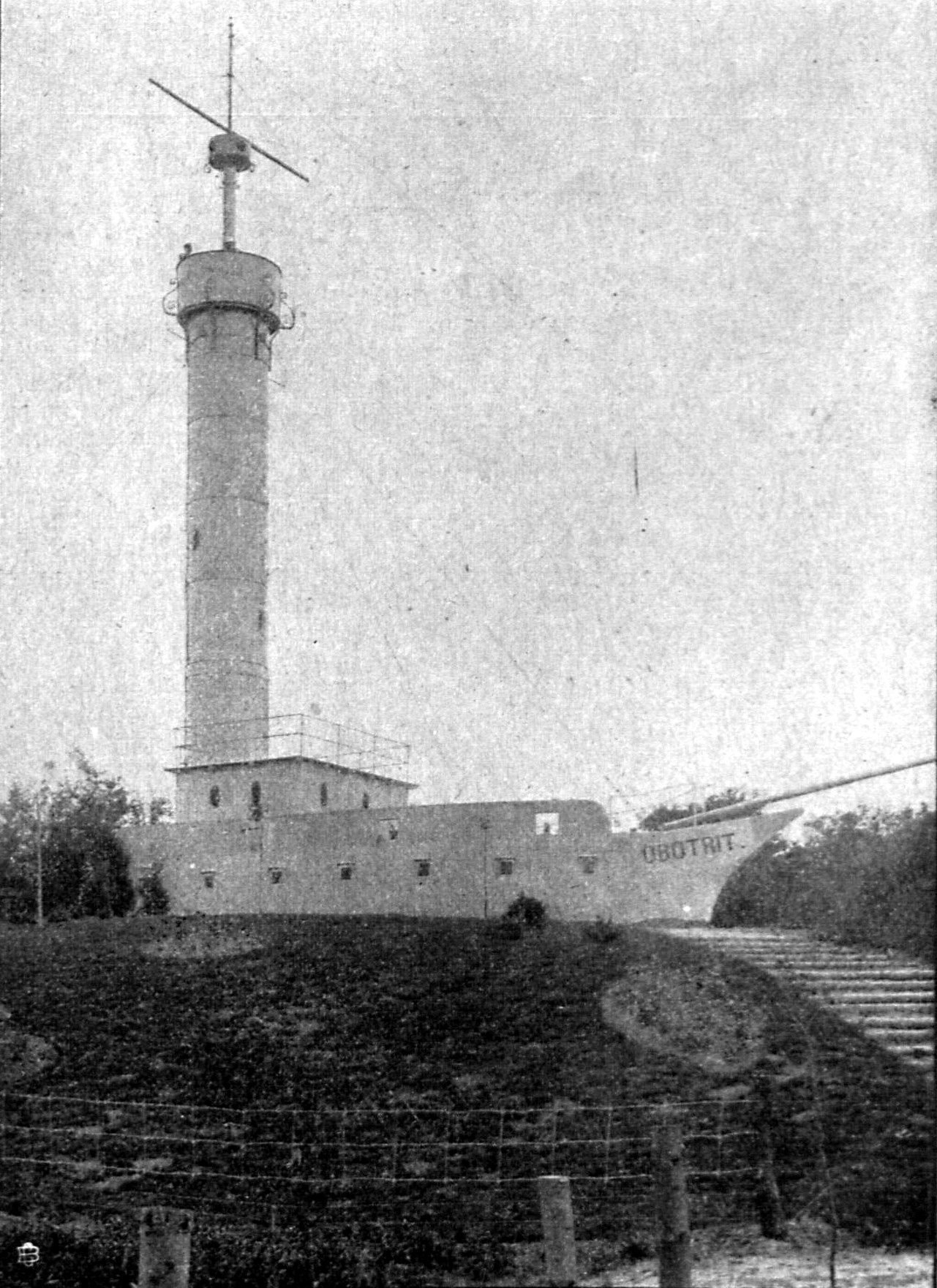 Der Besitzer des Gutes Gronenberg ließ auf einem Aussichtspunkte 1904 einen Aussichtsturm errichten, der seinerzeit durch seine Form auffiel. Der Aussichtsturm, der den Beinamen Kiek in de Welt erhielt, hatte die Form eines Gefechtsmastes eines Kriegsschiffes erhalten. Der Schiffskörper wurde als Wirtschaft genutzt.